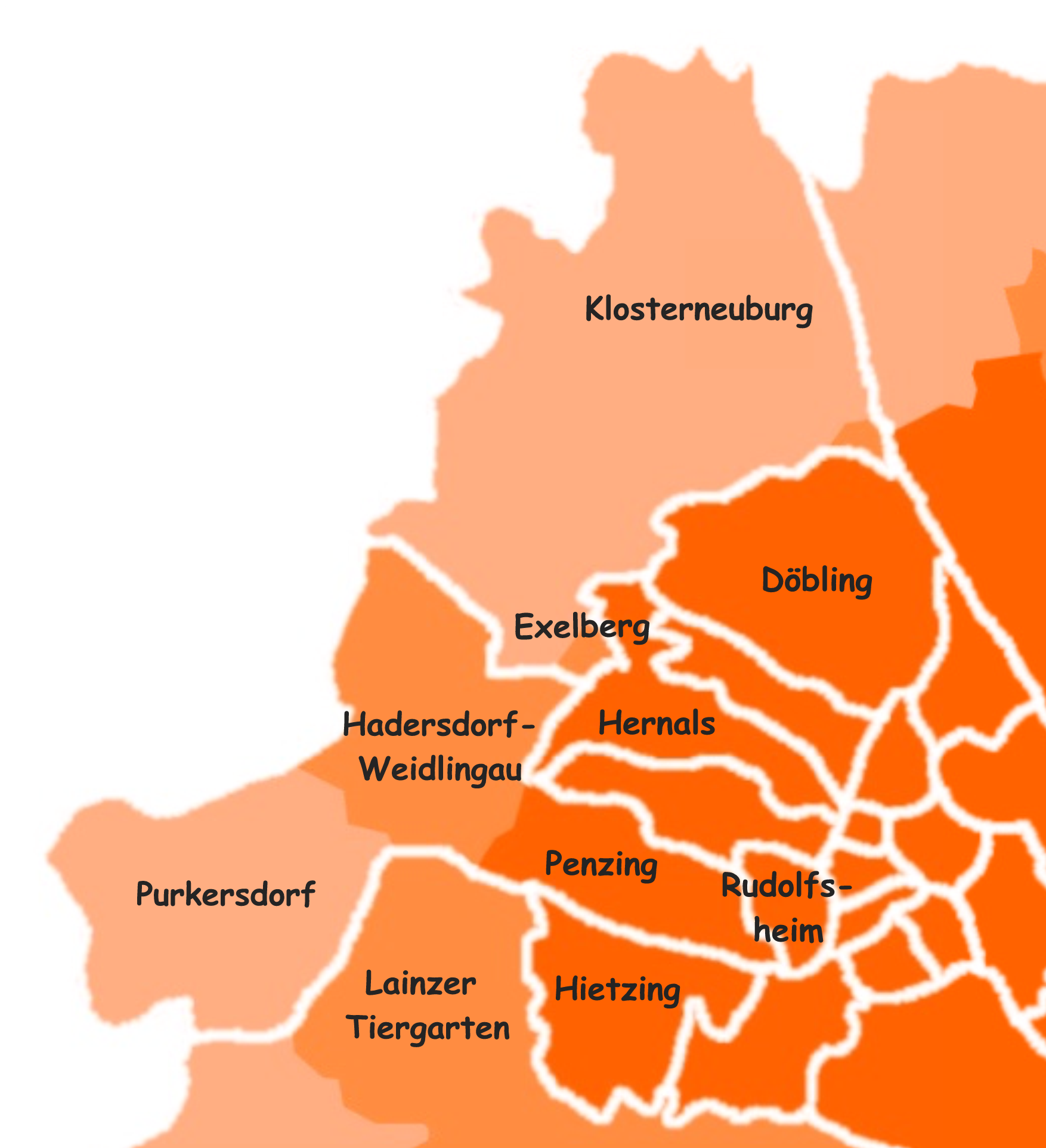 Karte von Groß-Wien (Detail)